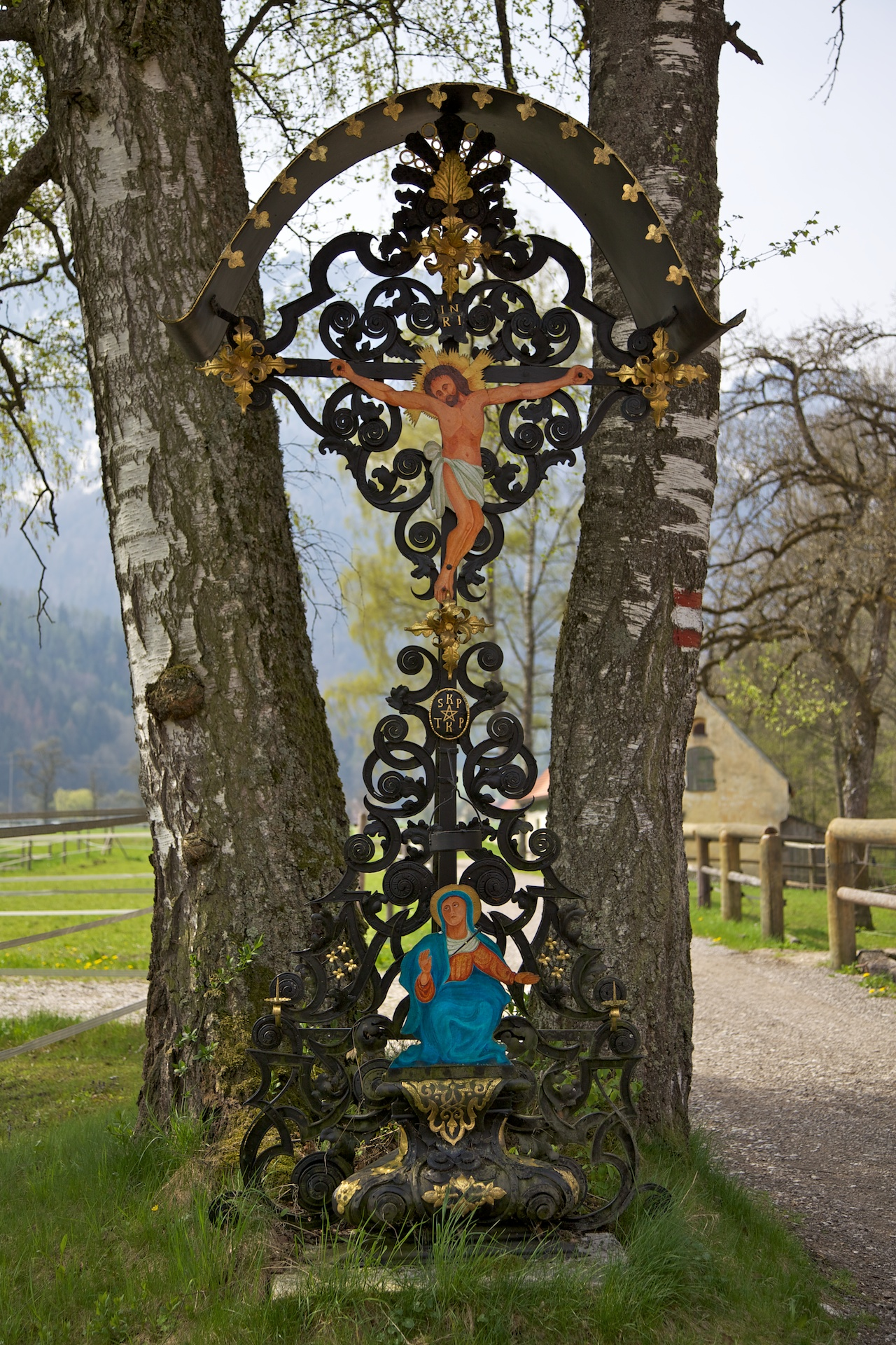 Das Pfusterkreuz auf dem Weg zum Kremsursprung, ein barockes Schmiedeeisen-Großgrabkreuz der Sensenschmiedefamilie Kaltenbrunner aus dem 18. Jahrhundert.